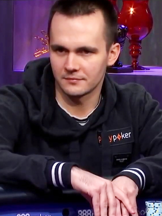 Mikita Badziakouski beim Super High Roller Bowl V